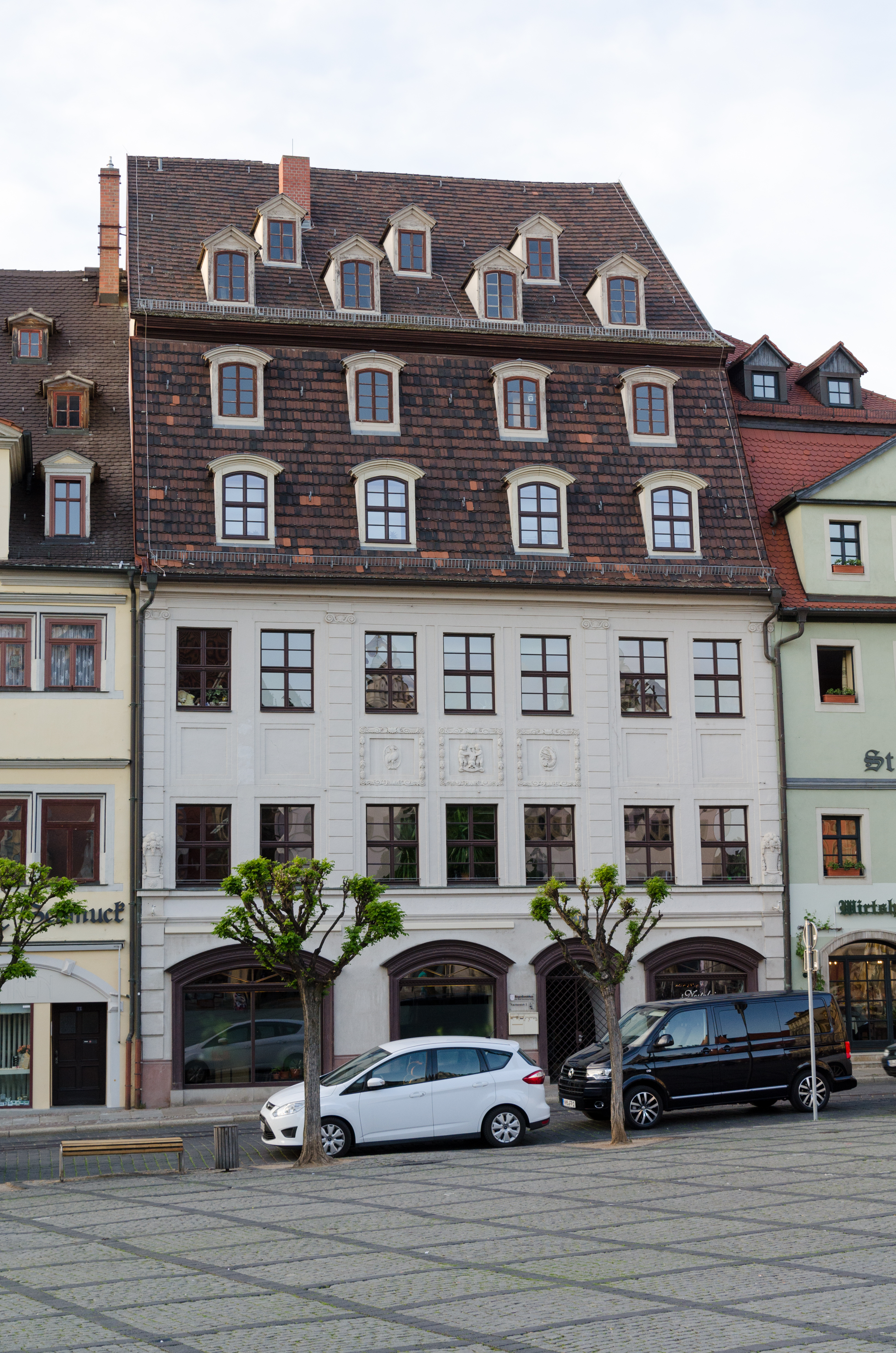 Naumburg, Markt 12